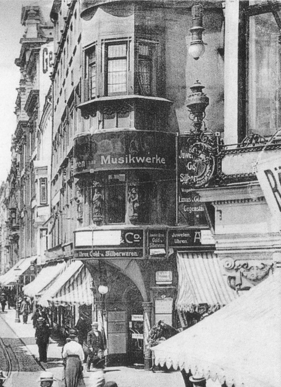 Erker am Gotischen Haus, Altmarkt (Ecke Schloßstraße/Wilsdruffer Straße), Dresden